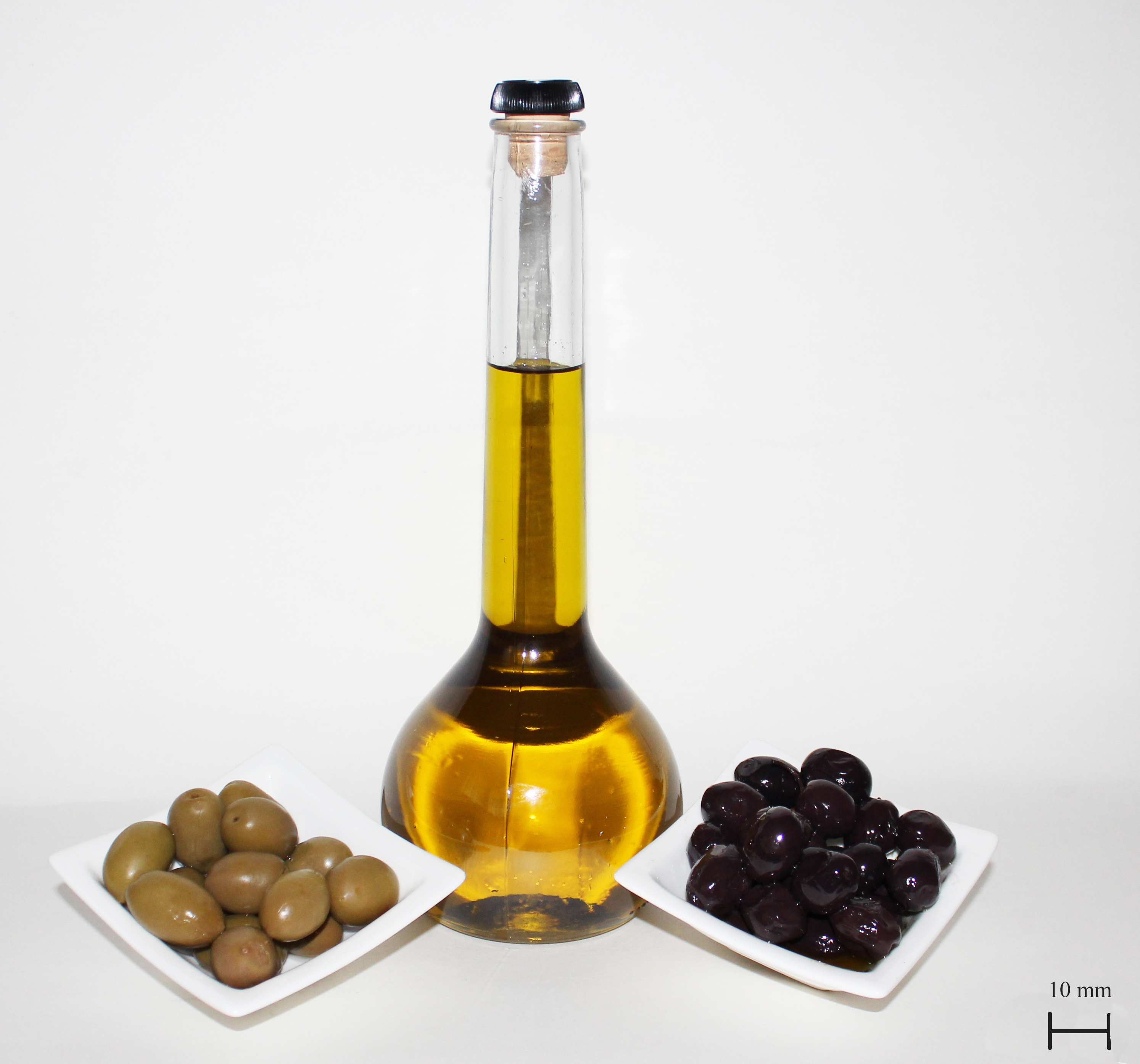 Olivenöl